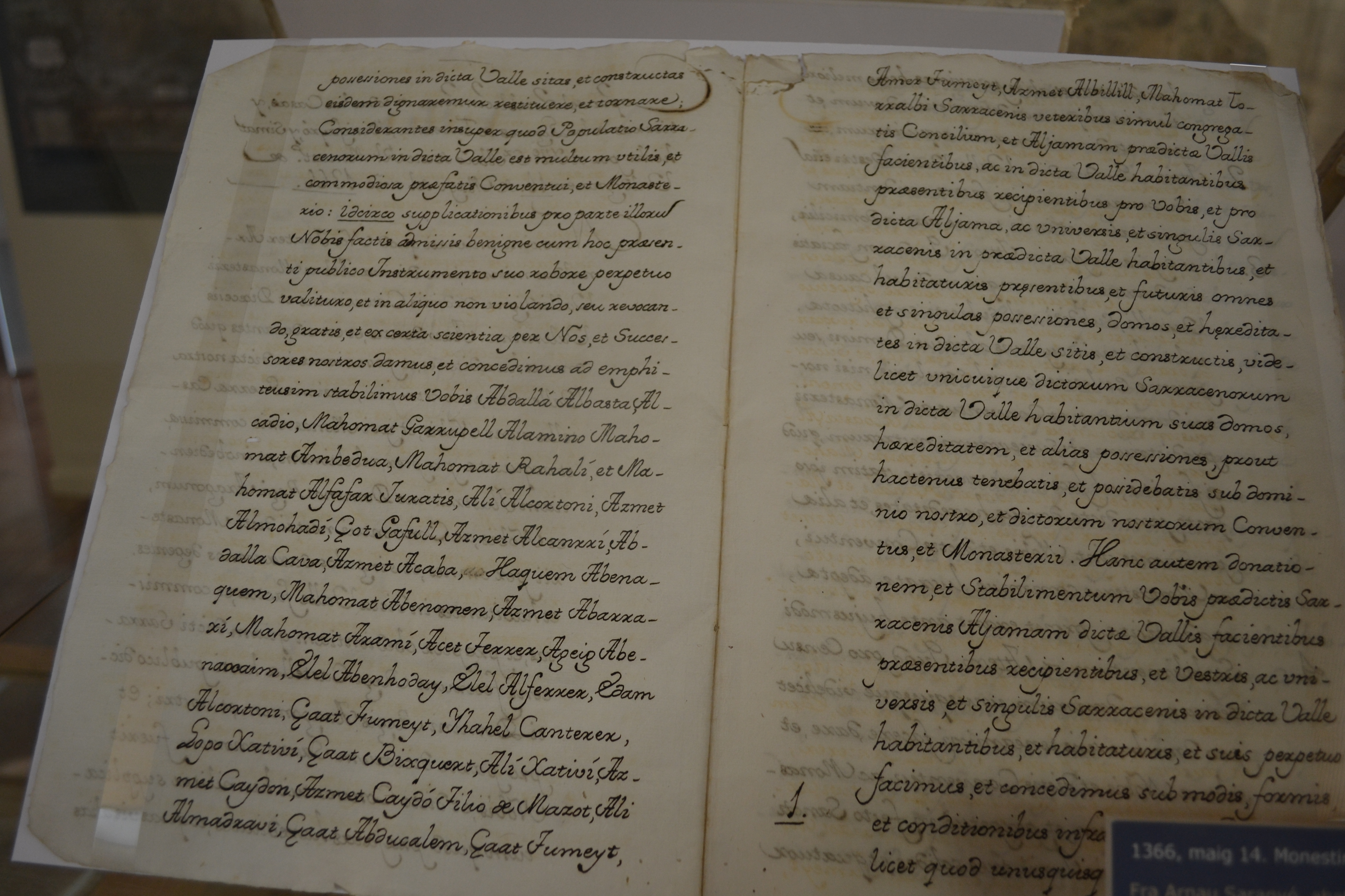 Carta puebla a musulmanes del valle de Valldigna: Fray Aranau Saranyó, abad del monasterio de Valldigna, otorga carta puebla a los musulmanes de dicho valle (Simat, Benifairó, Tavernes, Fulell y Ombría) después de la reciente guerra en ue tomaron parte en favor de los castellanos (14 de mayo de 1366) ARV. Clero, caja 1930 (copiad del siglo XVIII). Archivo del Reino de Valencia.